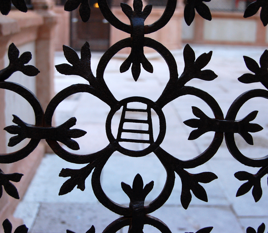 Un particolare della cancellata delle arche scegliere